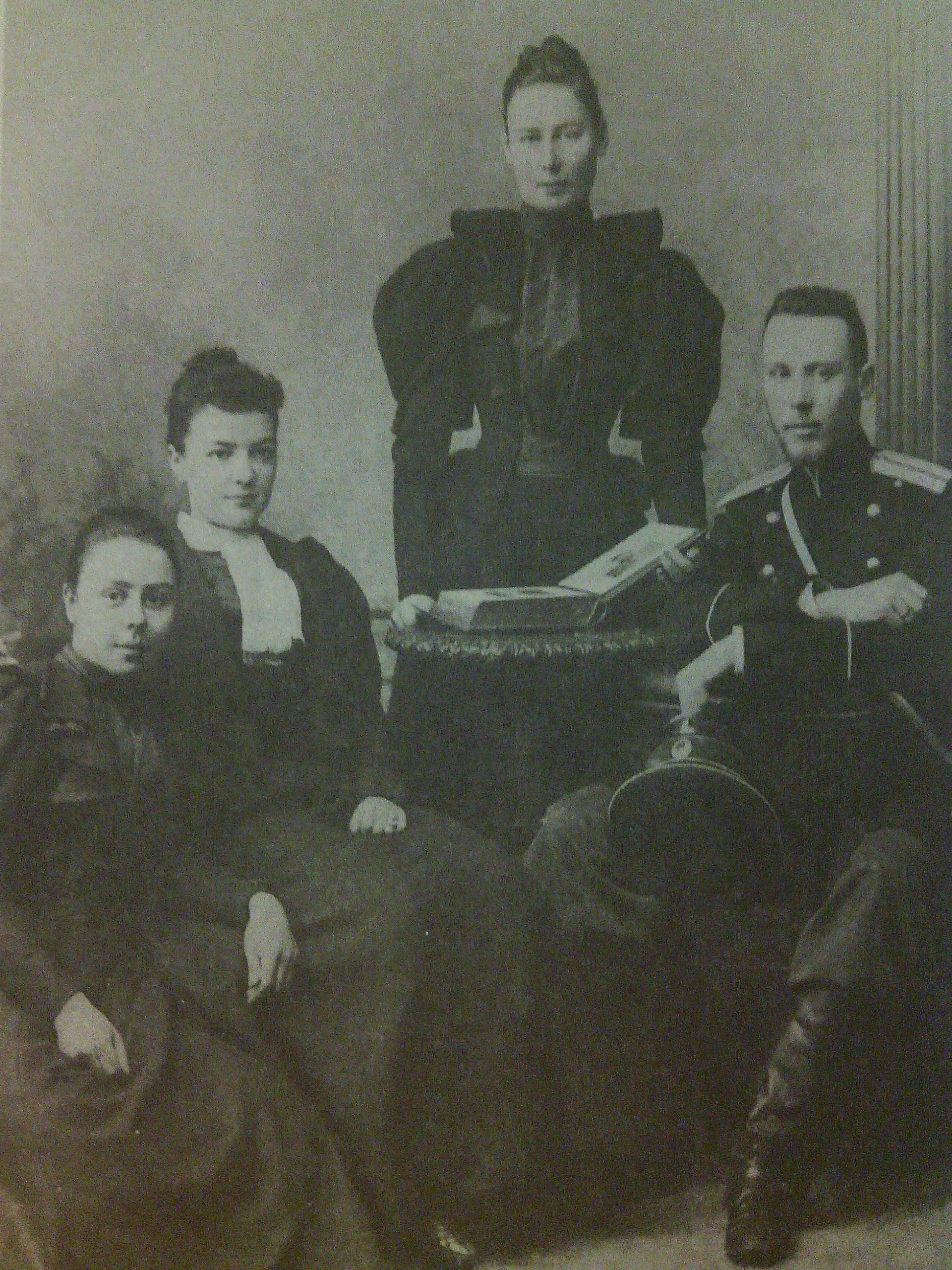 Граф Дмитрий Николаевич Татищев с женой Верой Анатольевной, ур. Нарышкиной, и сестрами Наталией и Ниной